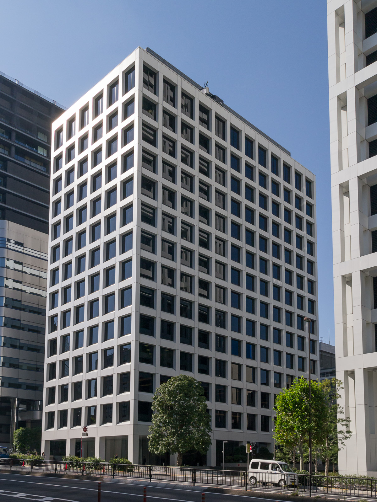 鹿島建設本社ビル、東京都港区元赤坂。